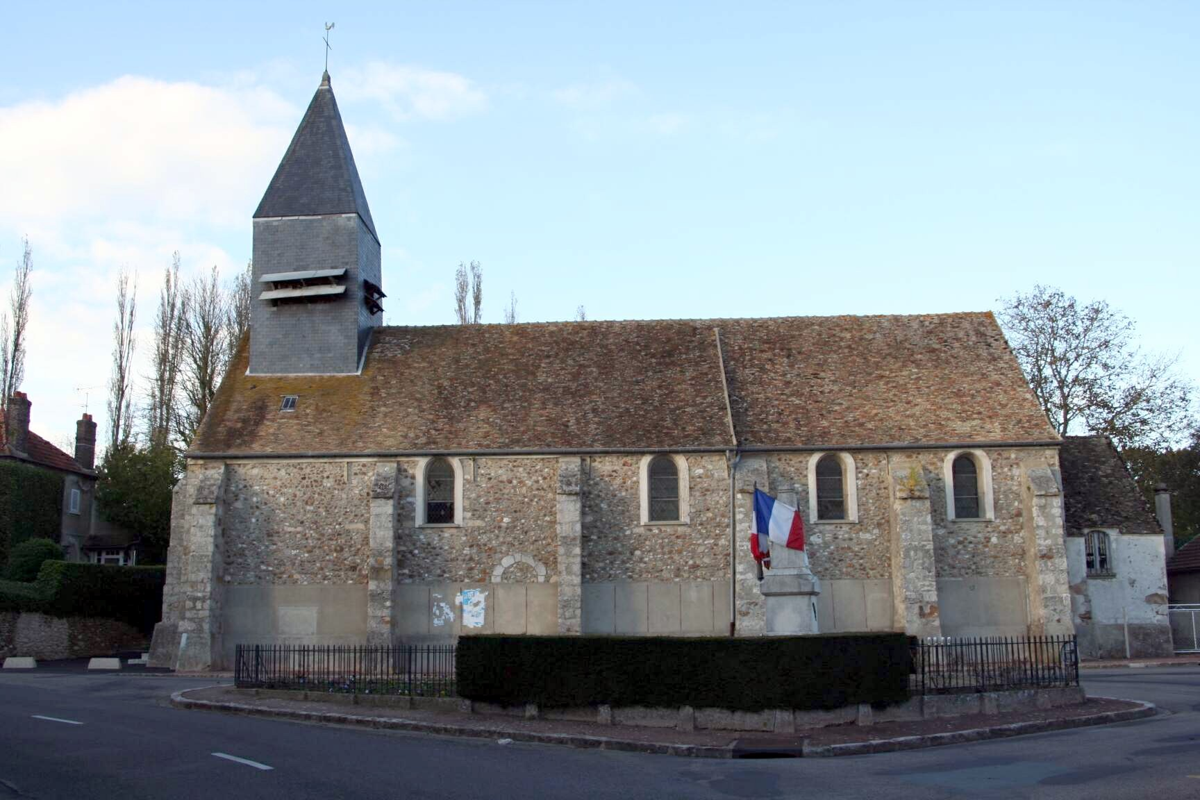 Église d'Orvilliers - Yvelines (France)